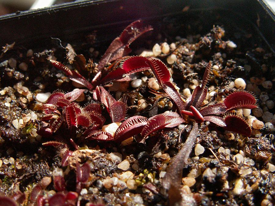 Dionaea muscipula 'Akai Ryu' in cultivation, Venusfliegenfalle in der Form 'Akai Ryu', die bei ausreichender Beleuchtung durchgängig rot erscheint